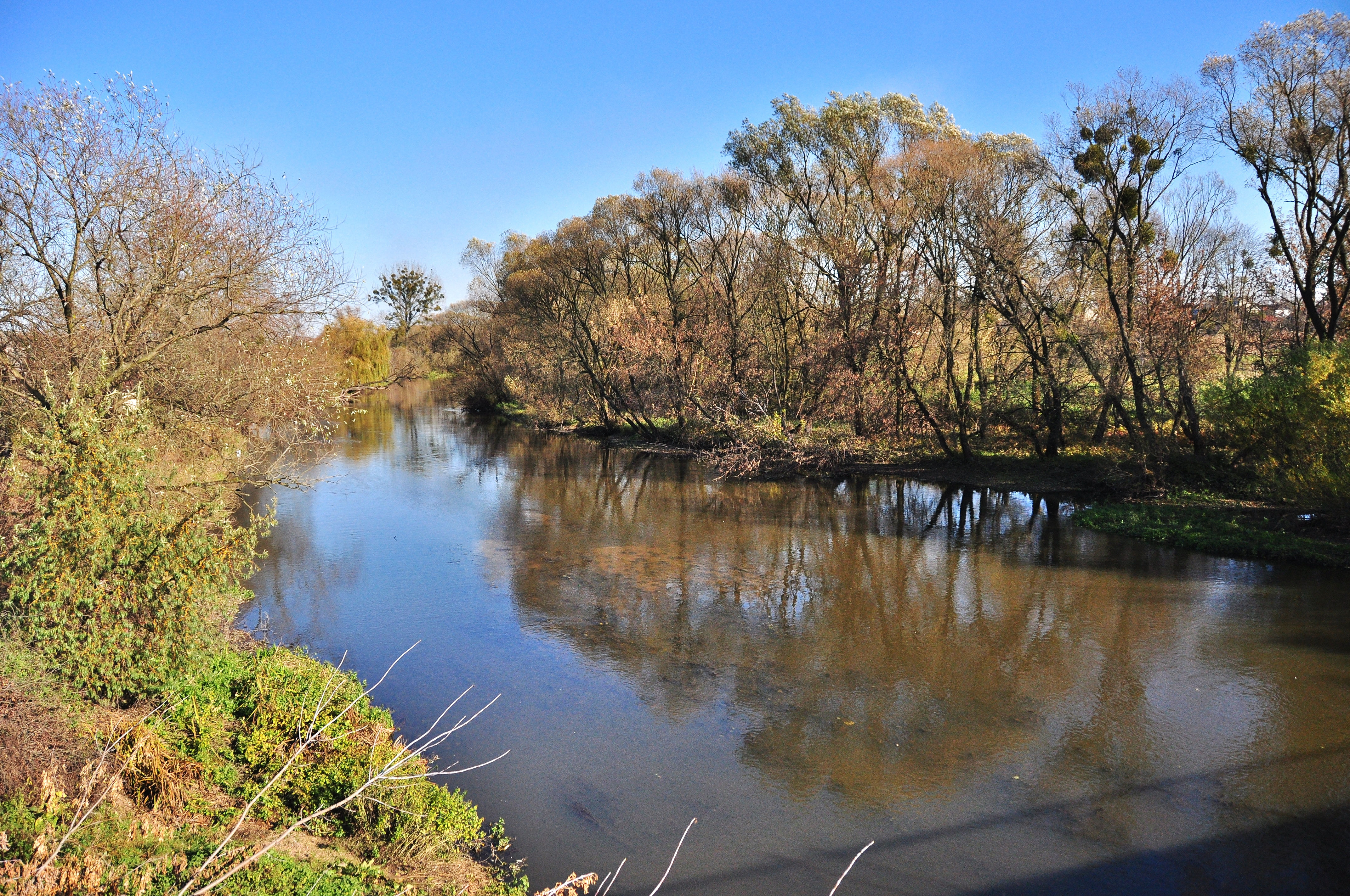 Річка Рата у Великих Мостах (з моста)